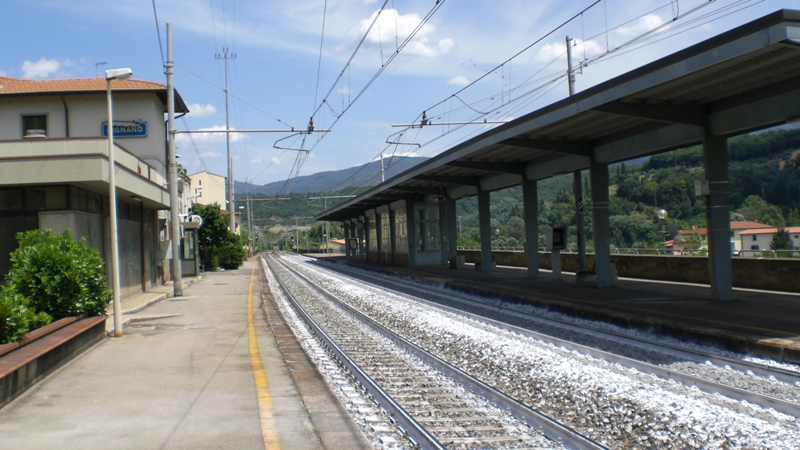 Stazione di Rignano sull'Arno provincia di Firenze